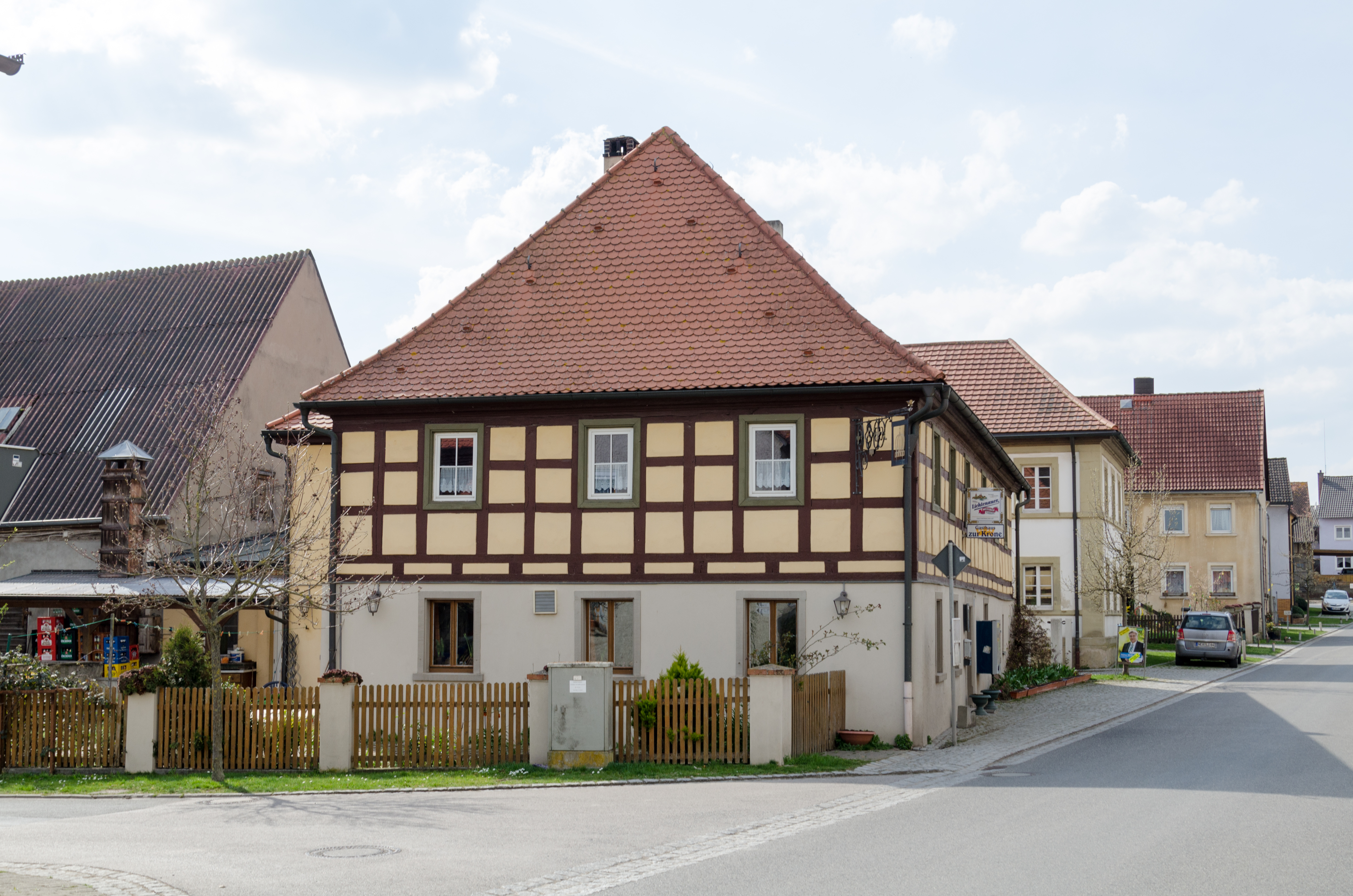 Sugenheim, Krautostheim 49